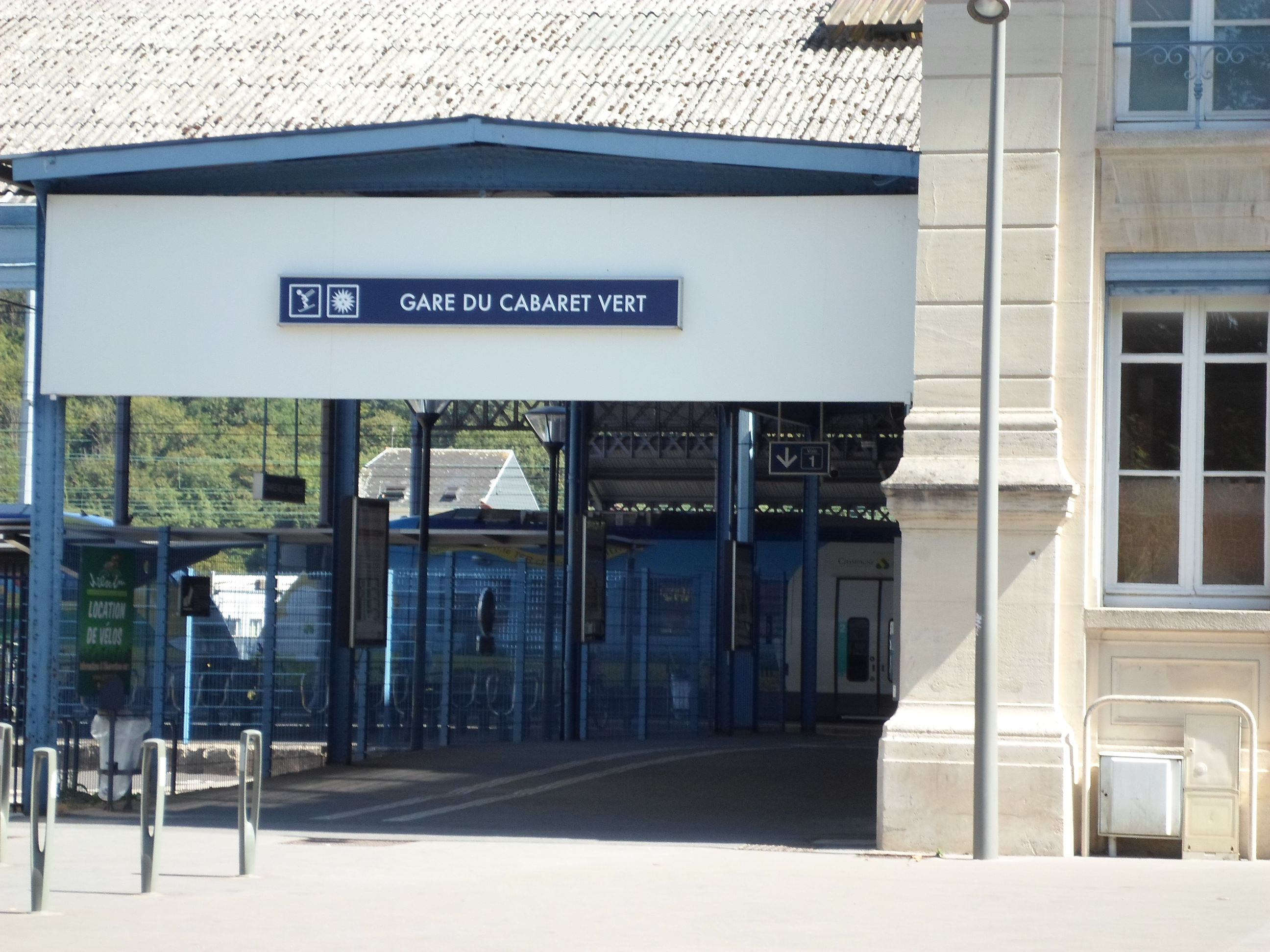 Gare de Charleville-Mézières : Passage d'accès aux quais, renommé gare du Cabaret Vert (à l'occasion du festival du Cabaret Vert 2018)